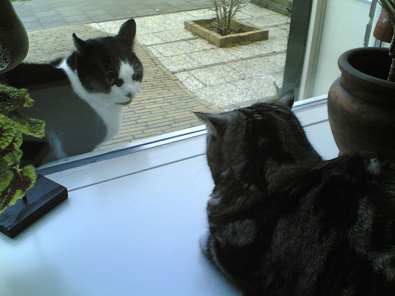 dit zijn Jip en Noah, dit zijn twee lieve poezemienen